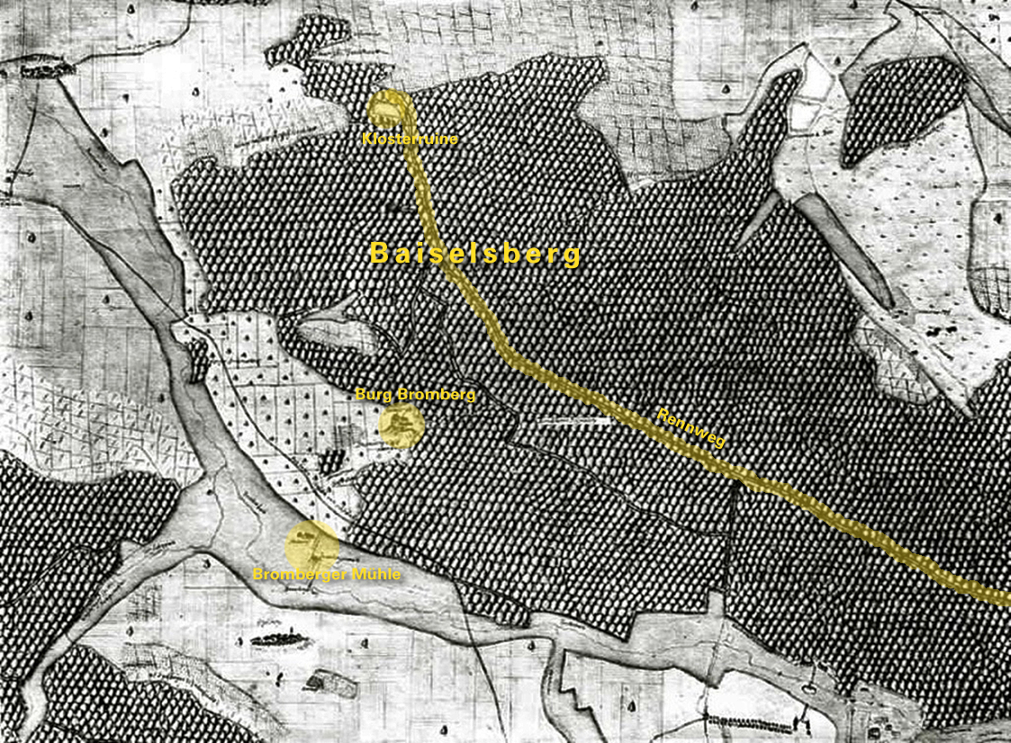 Baiselsberg mit Klosterruine, Rennweg, Burg Bromberg, Melkerei und Bromberger Mühle auf der Kieserschen Forstkarte. Originaltitel des Landesmedienzentrums: „Spilberg (Spielberg)“ (Nr. 98). Originalbeschreibung: „Ansicht vom ehem. Schloss Bromberg. Mit Melkerei und Bromberger Mühl und Steg. Mit Under Haslach (Niederhaslach).”